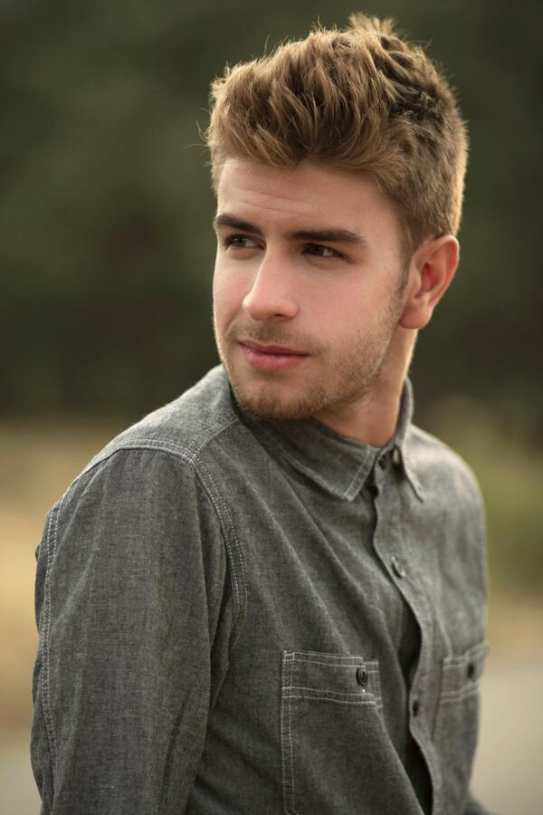 Mario Marzo